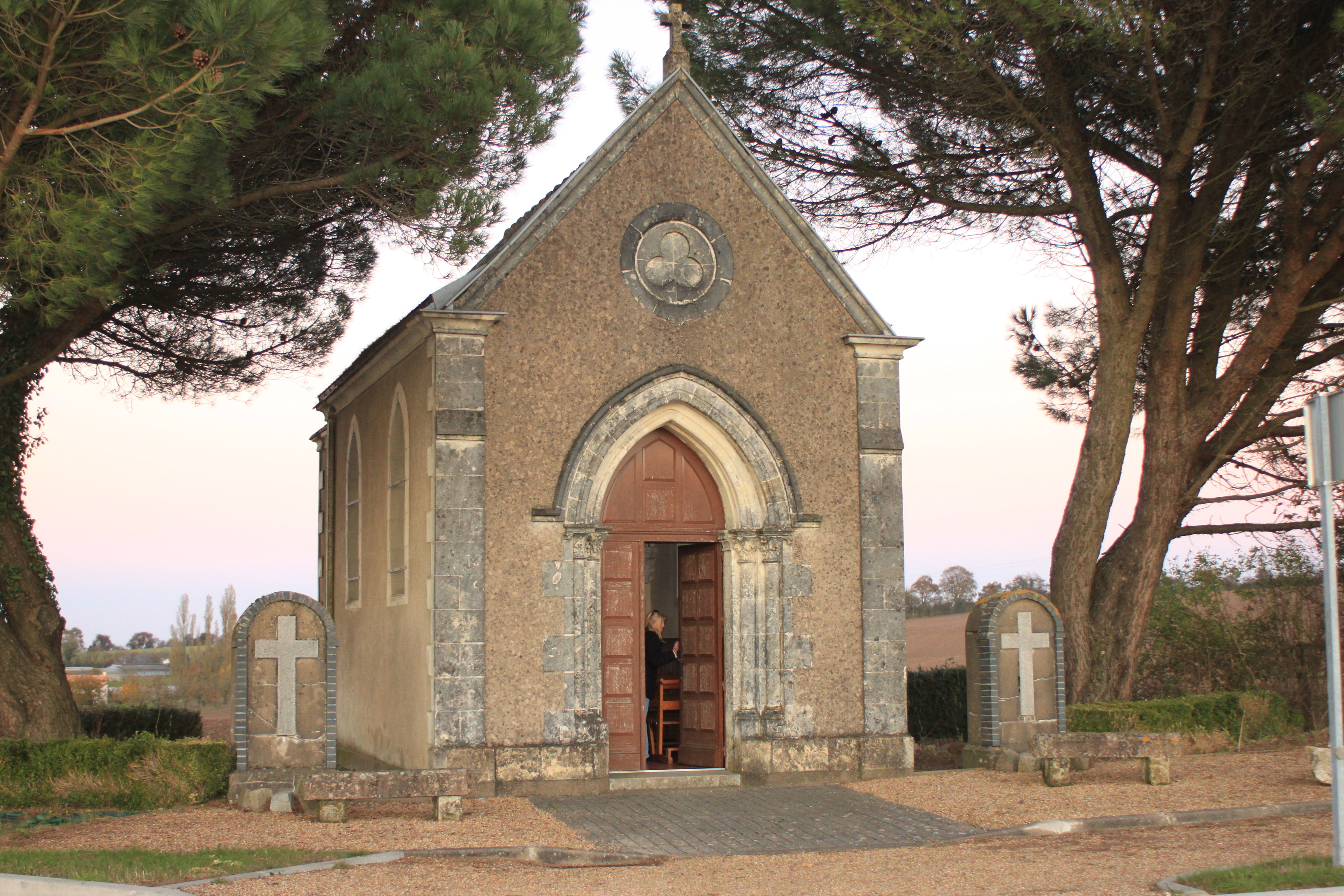 Chapelle Notre-Dame-du-Sacré-Cœur, dite de la Croix-Malo, Fr-49-Beausse.